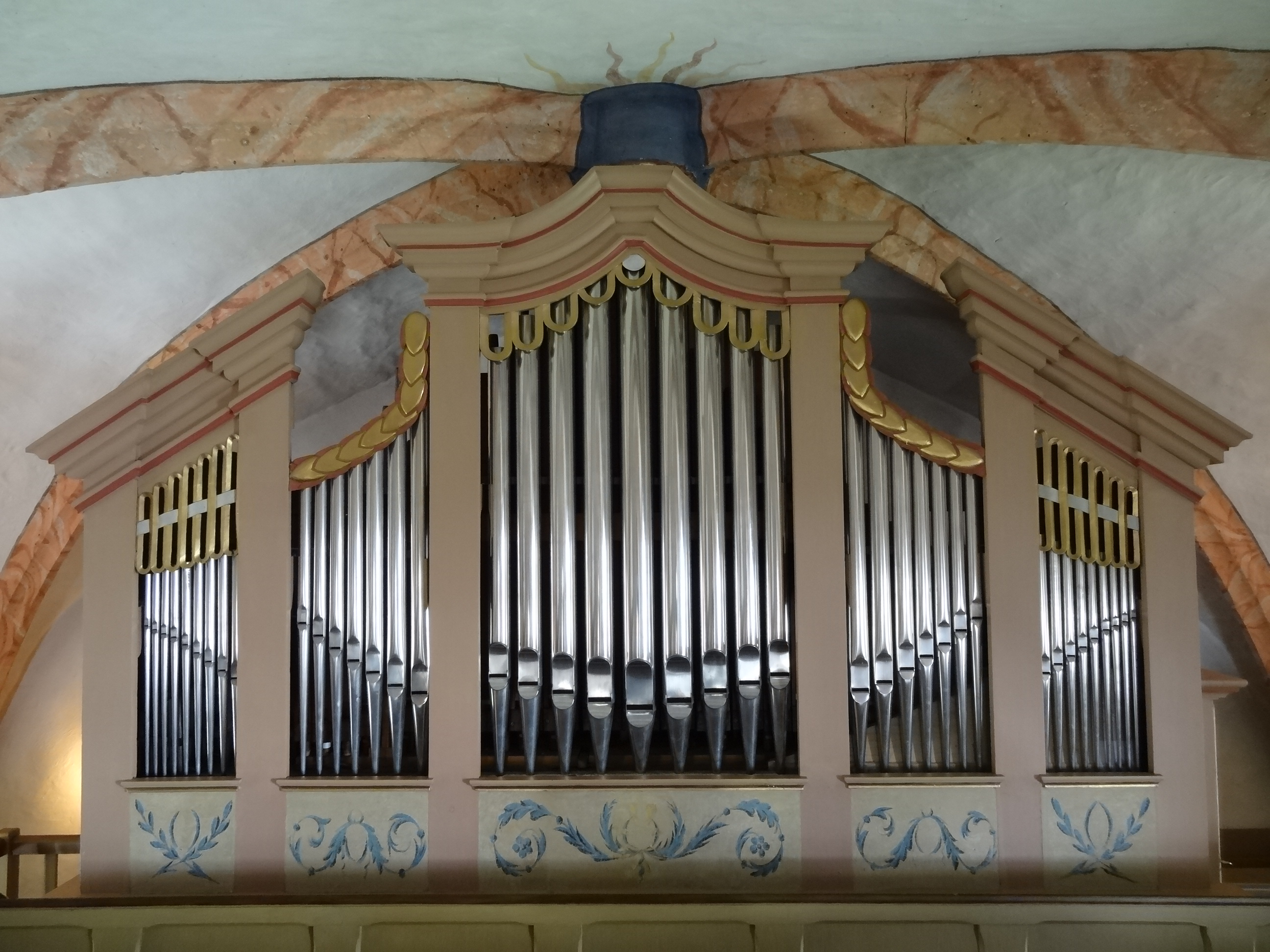 Evangelische Kirche (Ober-Bessingen)